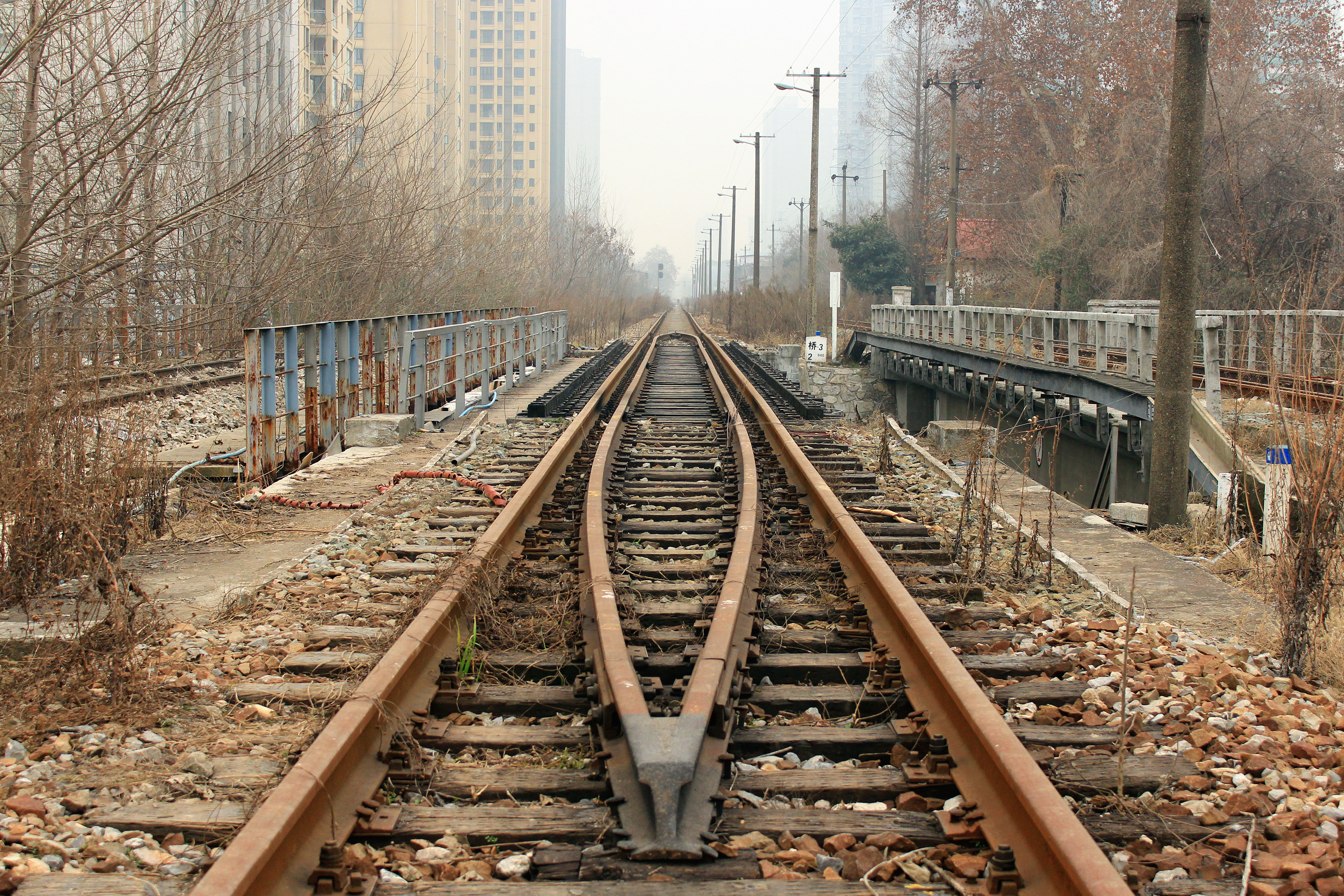 中文（中国大陆）: 已废弃的沙湖站